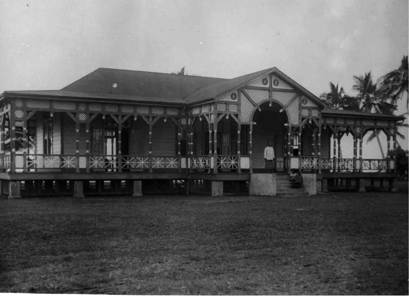 Sitz der samoanischen Eingeborenenverwaltung